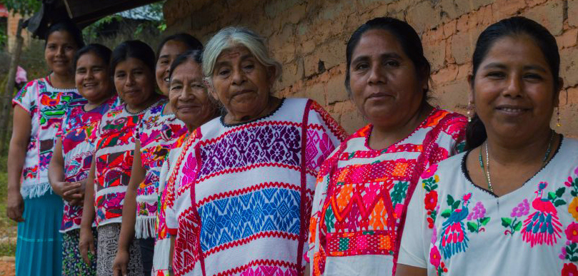 Mujeres Ñuu Savi de Capulín, Mpio. de Tlacoachistlahuaca, Gro.